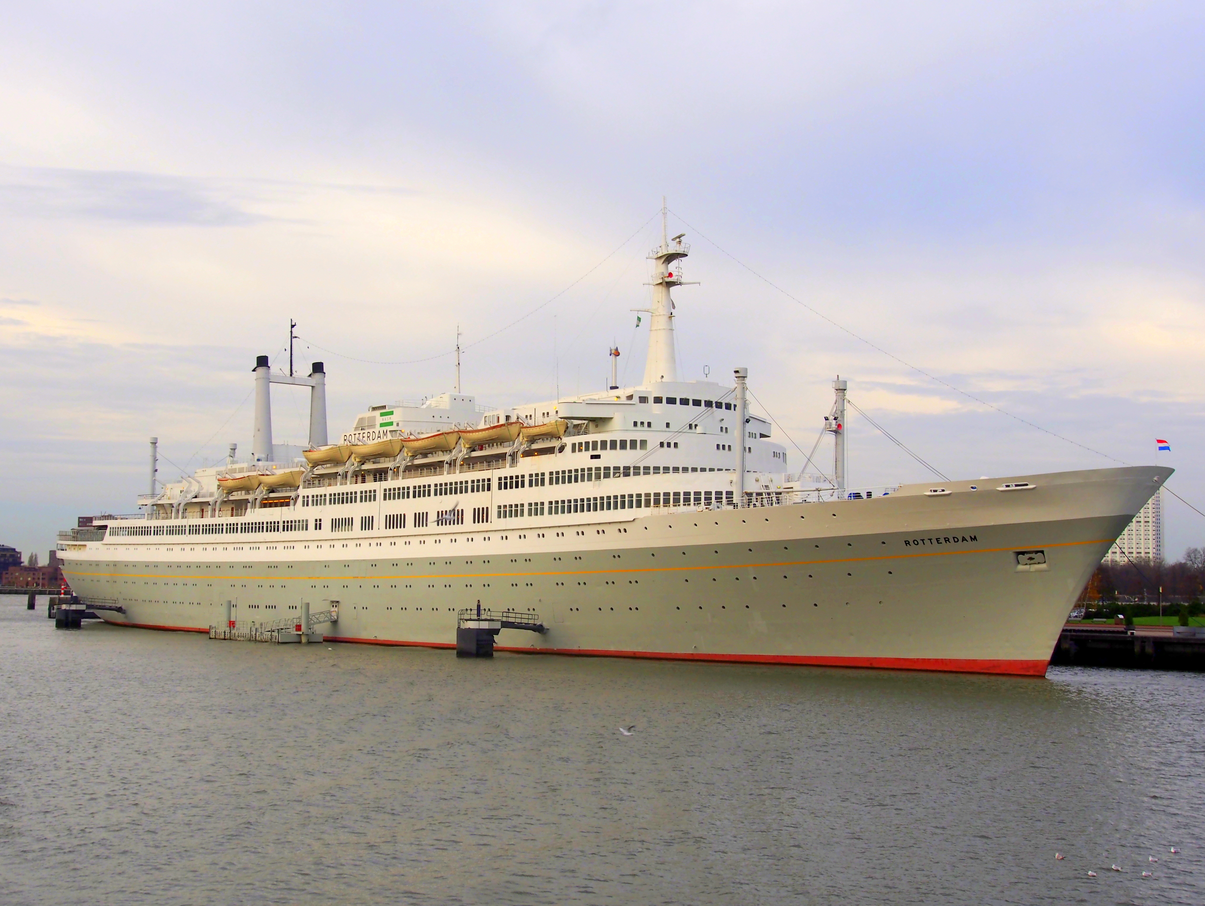 Enamel advertising signs photographed at the Verzamelaarsjaarbeurs, Utrecht.